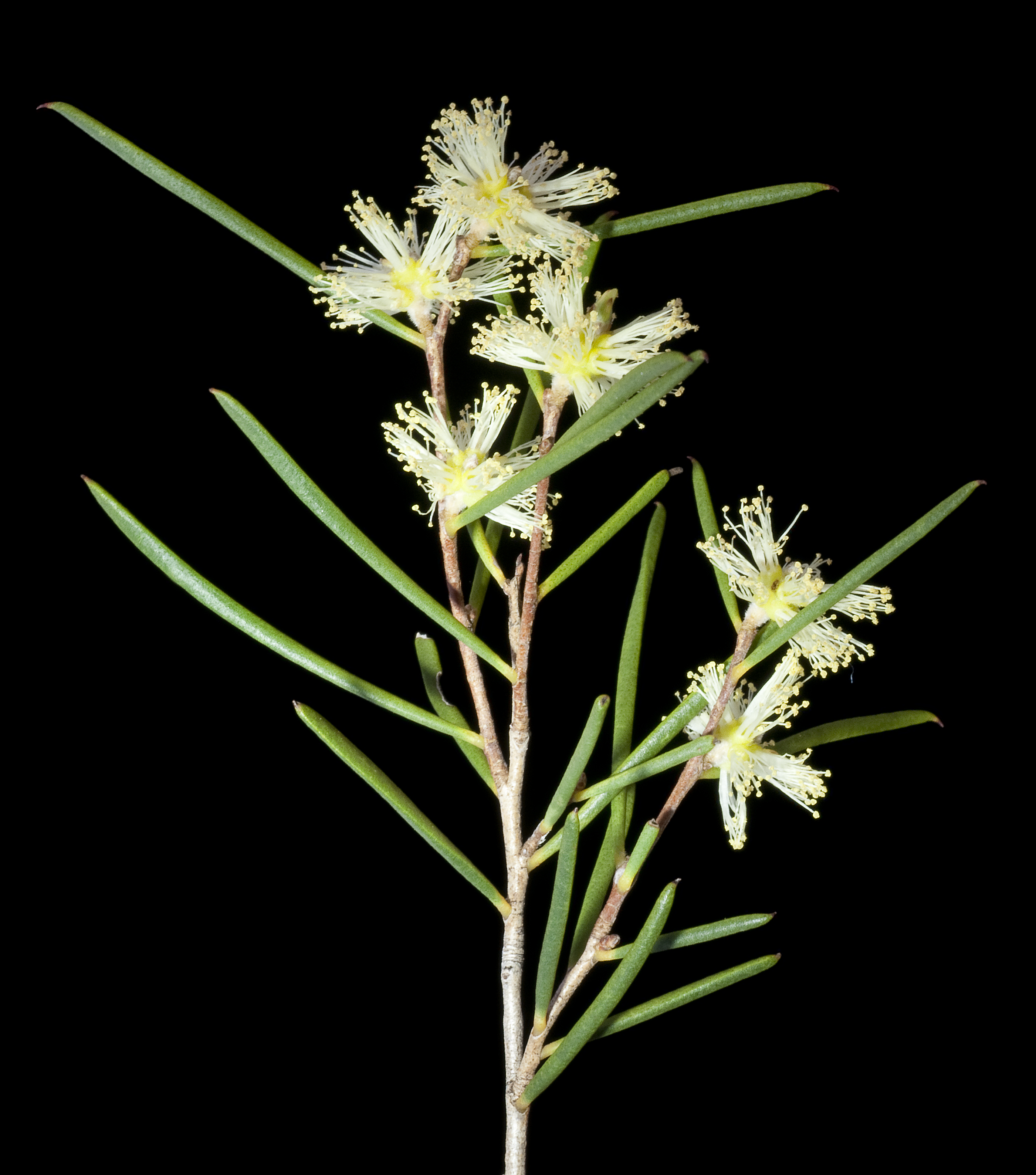 KRT4156